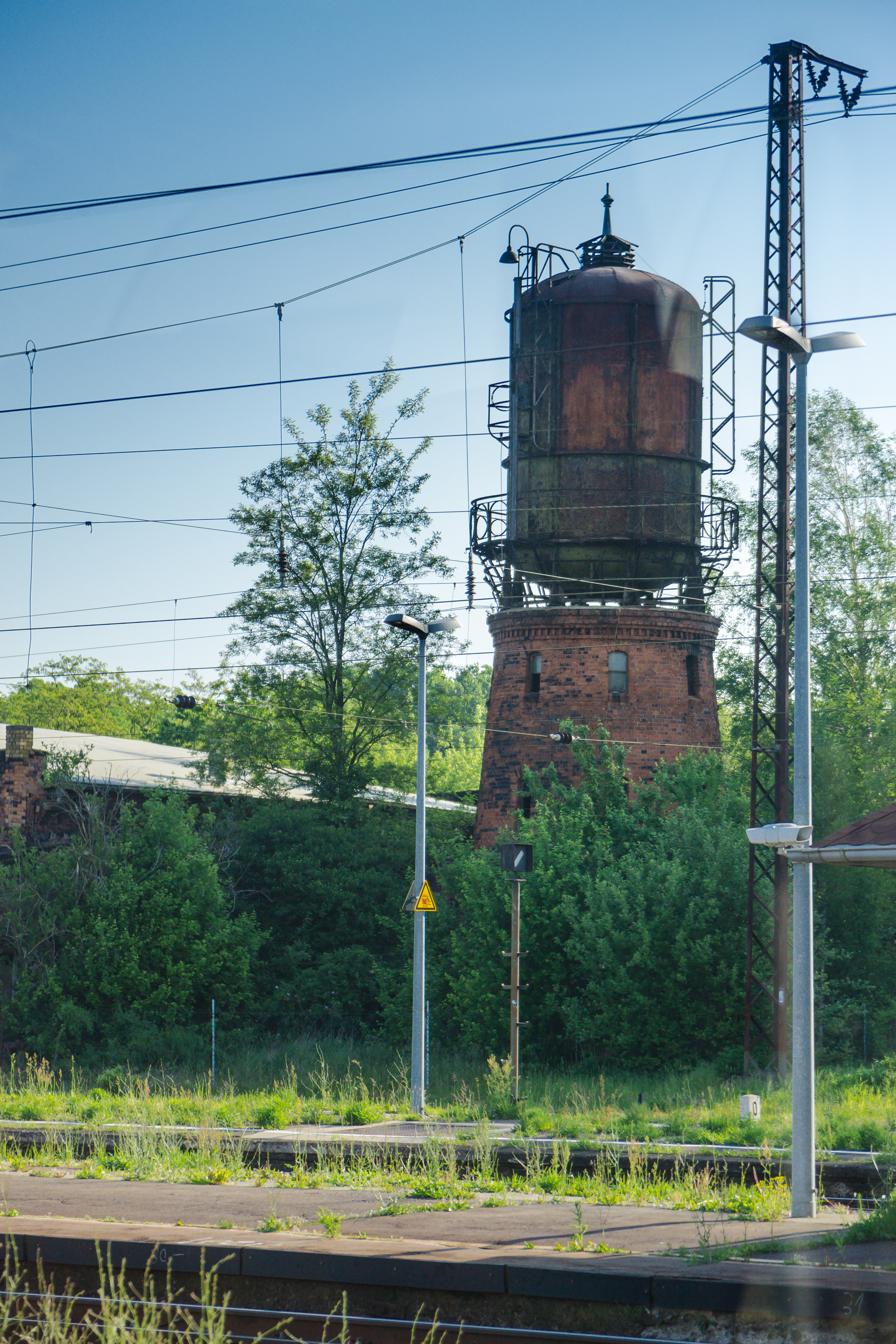 Wasserturm, nördlich des Bahnhofsgebäudes in Weißenfels OT Großkorbetha